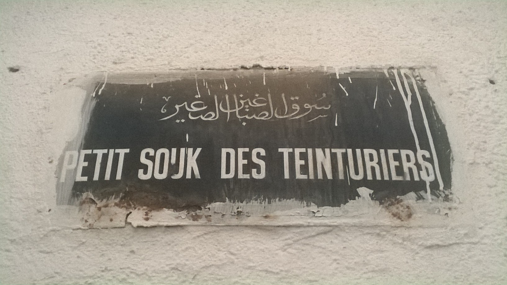 Souk des Teinturiers, medina de Tunis سوق الصباغين , مدينة تونس العتيقة